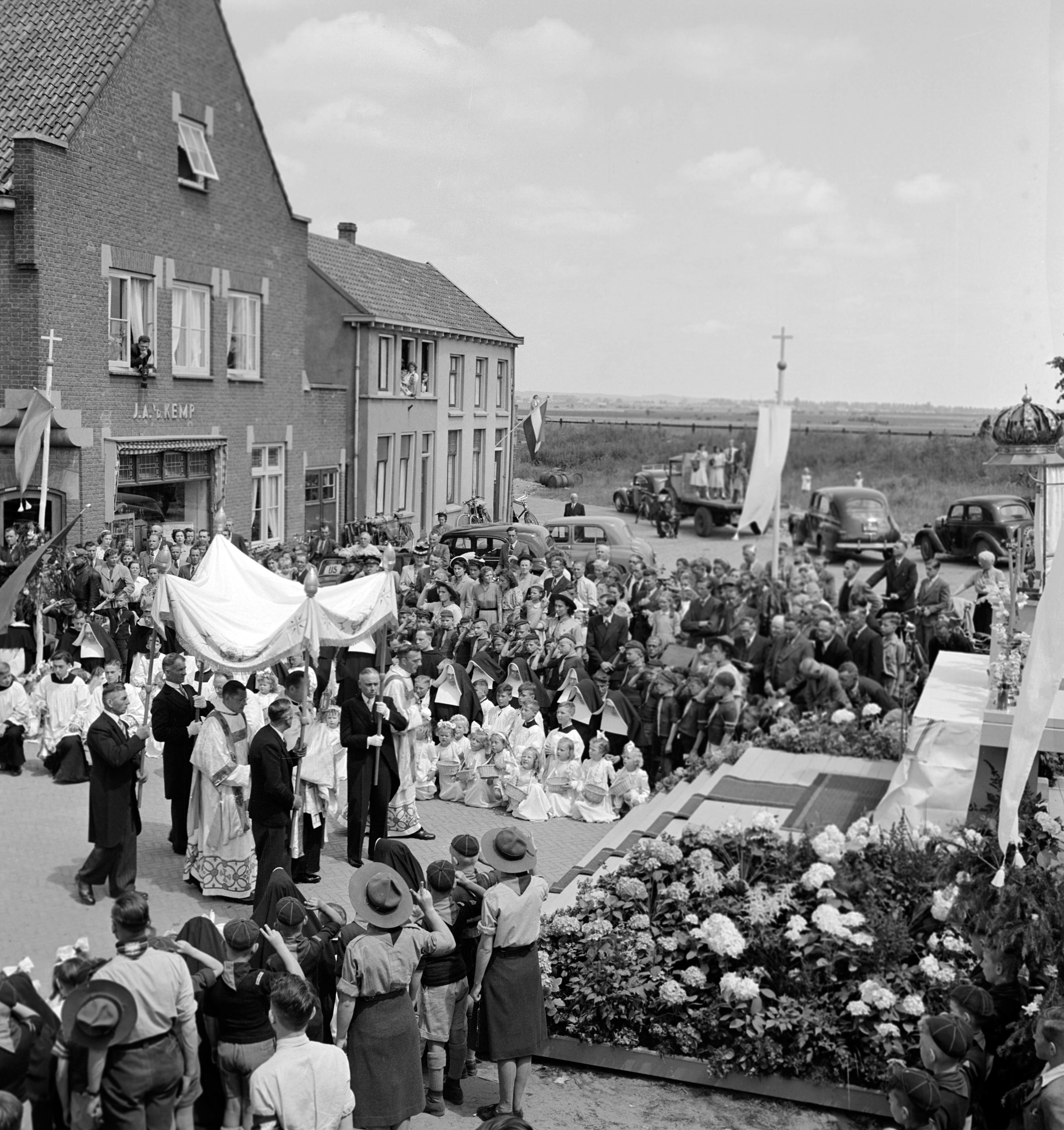 Sacramentsprocessie in Huissen in 1950. Stop op de Markt.